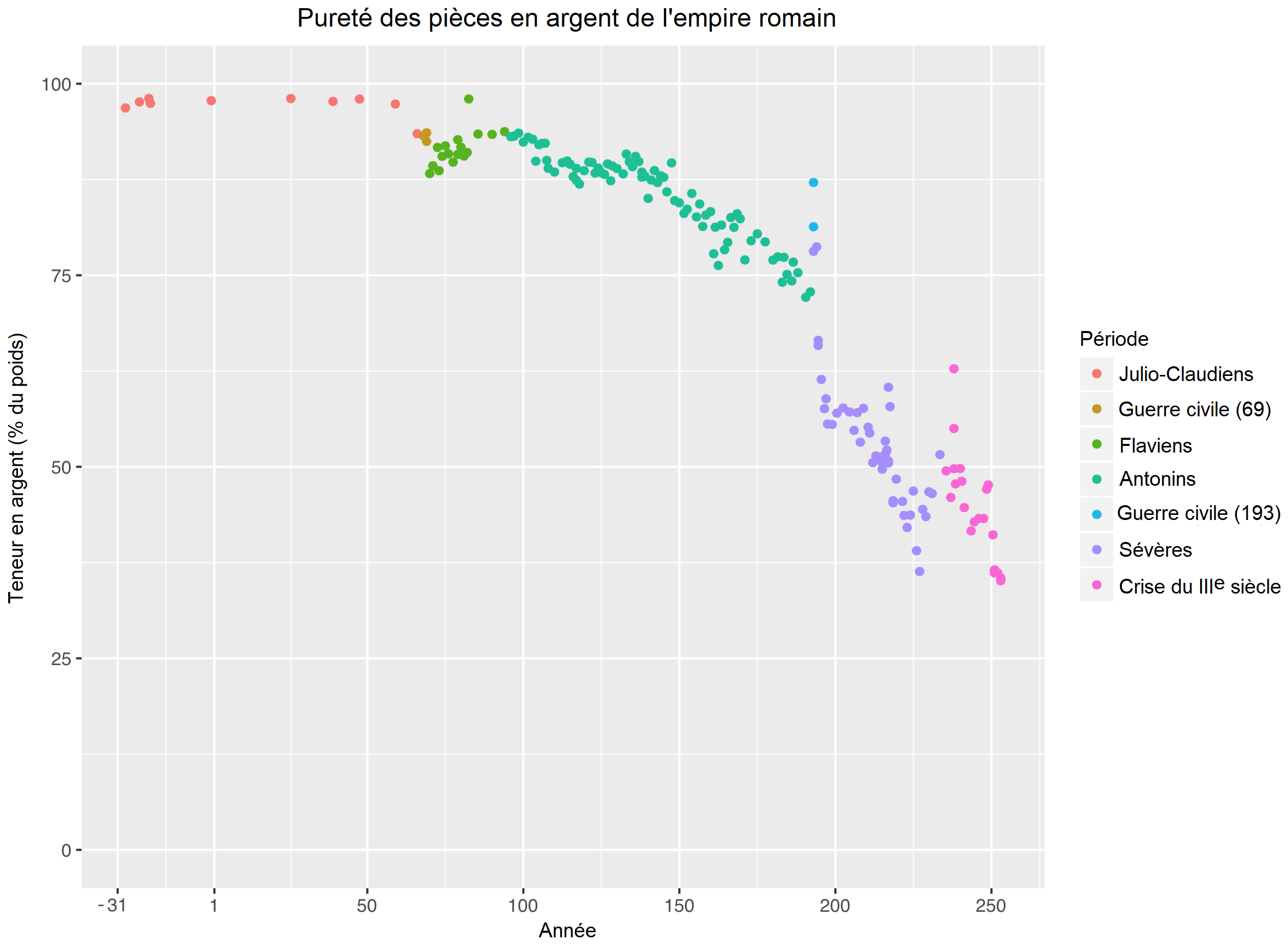 Données de Walker, D.R. (1976-78), The Metrology of the Roman Silver Coinage. Parts I to III. Avant la guerre civile de 69, la date de fabrication d'une pièce au sein d'un règne est généralement inconnue. Pendant et après la guerre civile de 69, la plupart des pièce peut être datée à l'année, ou à deux ans près. Ici, sont représentées les données pour le denier et l'antoninien, et sont donc exclus le quinaire et les monnaies orientales (drachme, cistophorus, etc.) Notons que, selon Butcher and Ponting (2009, "The Silver Coinage of Roman Syria Under the Julio-Claudian Emperors"), les données de Walker, qui sont basées sur un grattage de la surface de la pièce (plutôt que son analyse par destruction complète), peuvent surestimer la teneur en argent. Ils estiment que la surface des pièces examinées par Walker auraient pu perdre une partie du cuivre pendant la fabrication, les siècles d'enterrement, et le nettoyage après la découverte.